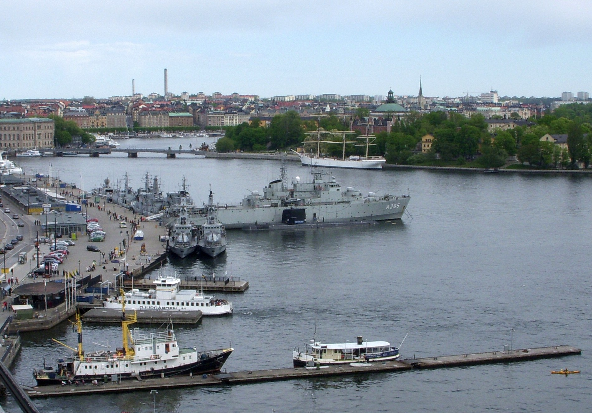 Skeppsbron och Räntmästartrappan, vy från Katarinahissen. Två närmaste fartygen vid kajen är korvetterna HMS Gävle (K22) och HMS Sundsvall (K24). Stora fartyget är HMS Visborg (A265). Ubåten framför Visborg är HMS Uppland (Upd).